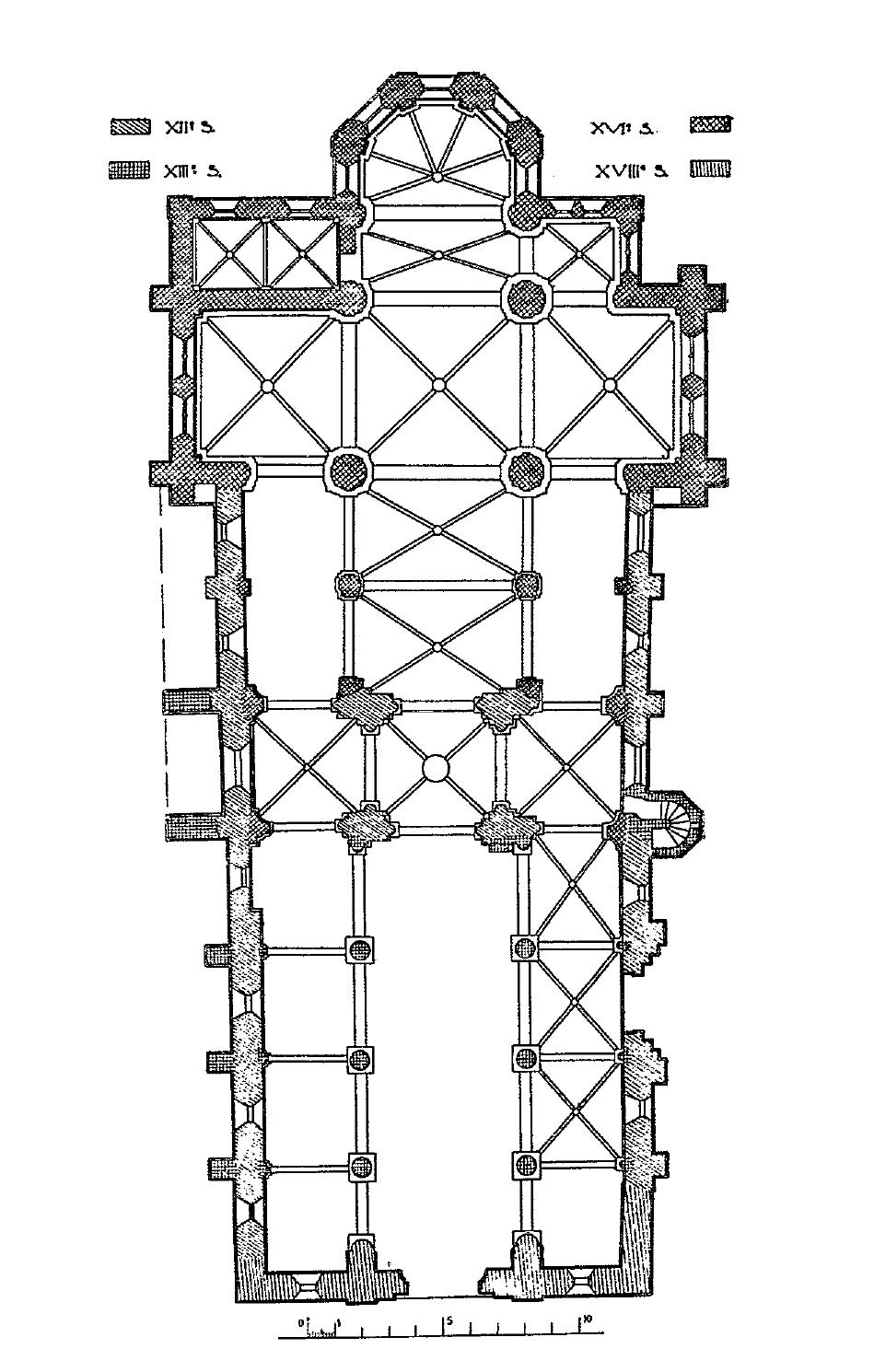 Plan des masses de l'église.